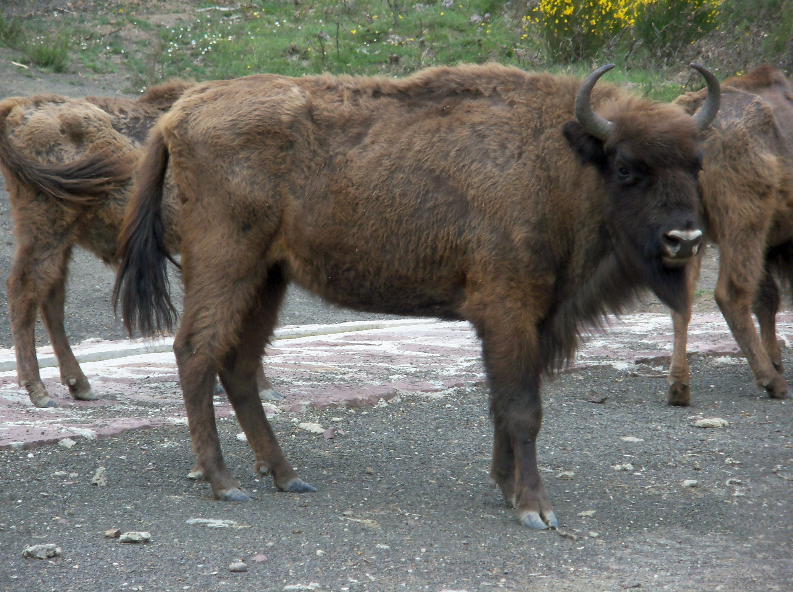 Bisonte europeo en el centro de San Cebrián de Mudá, Castilla y León, España